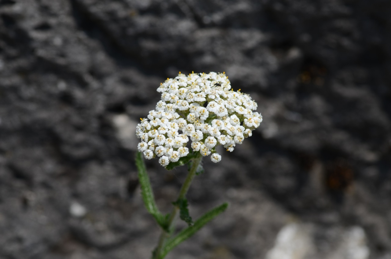 Achillea collina